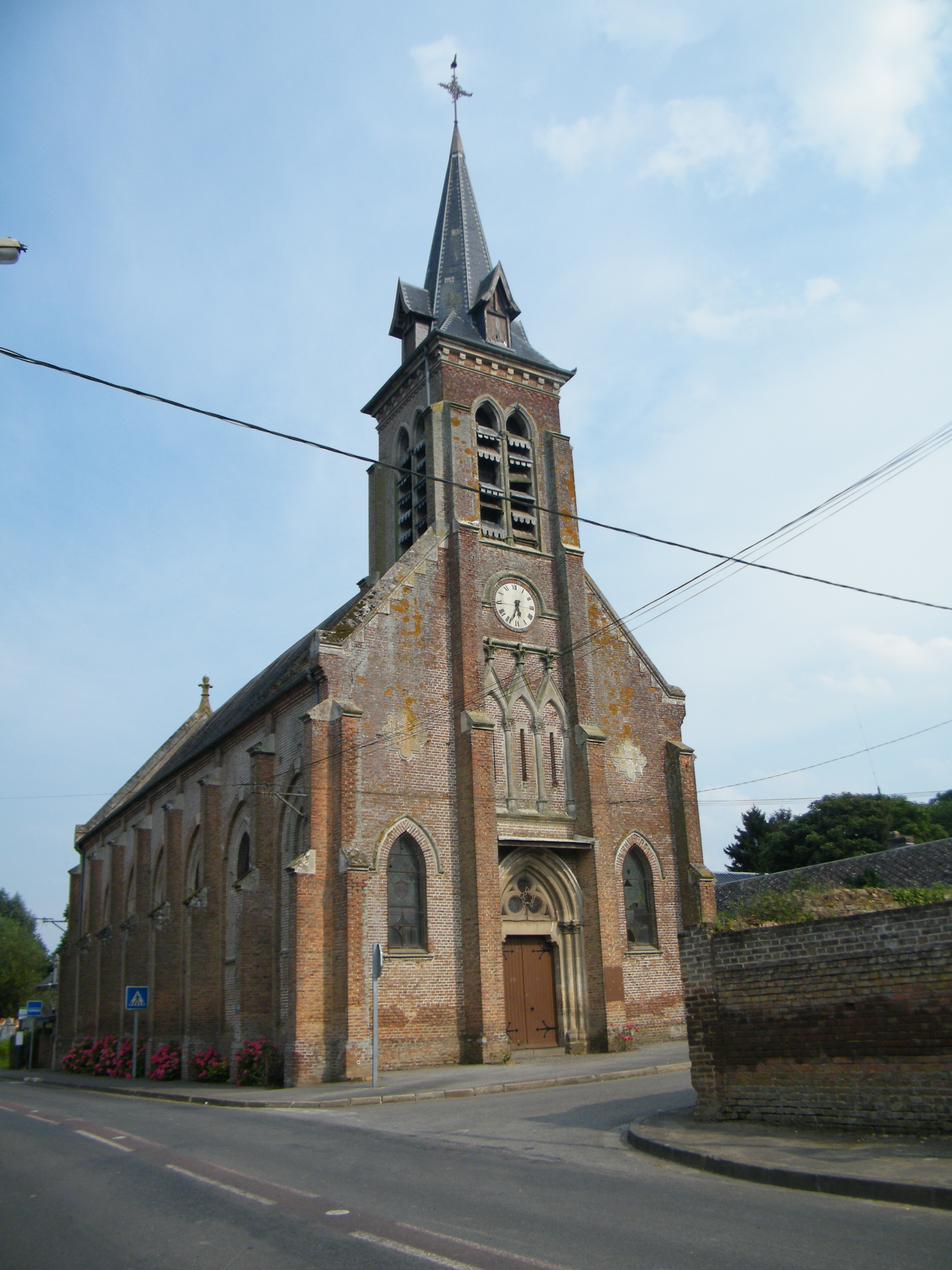 église.